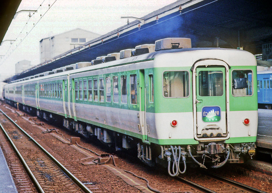 国鉄12系 お座敷客車「白樺」